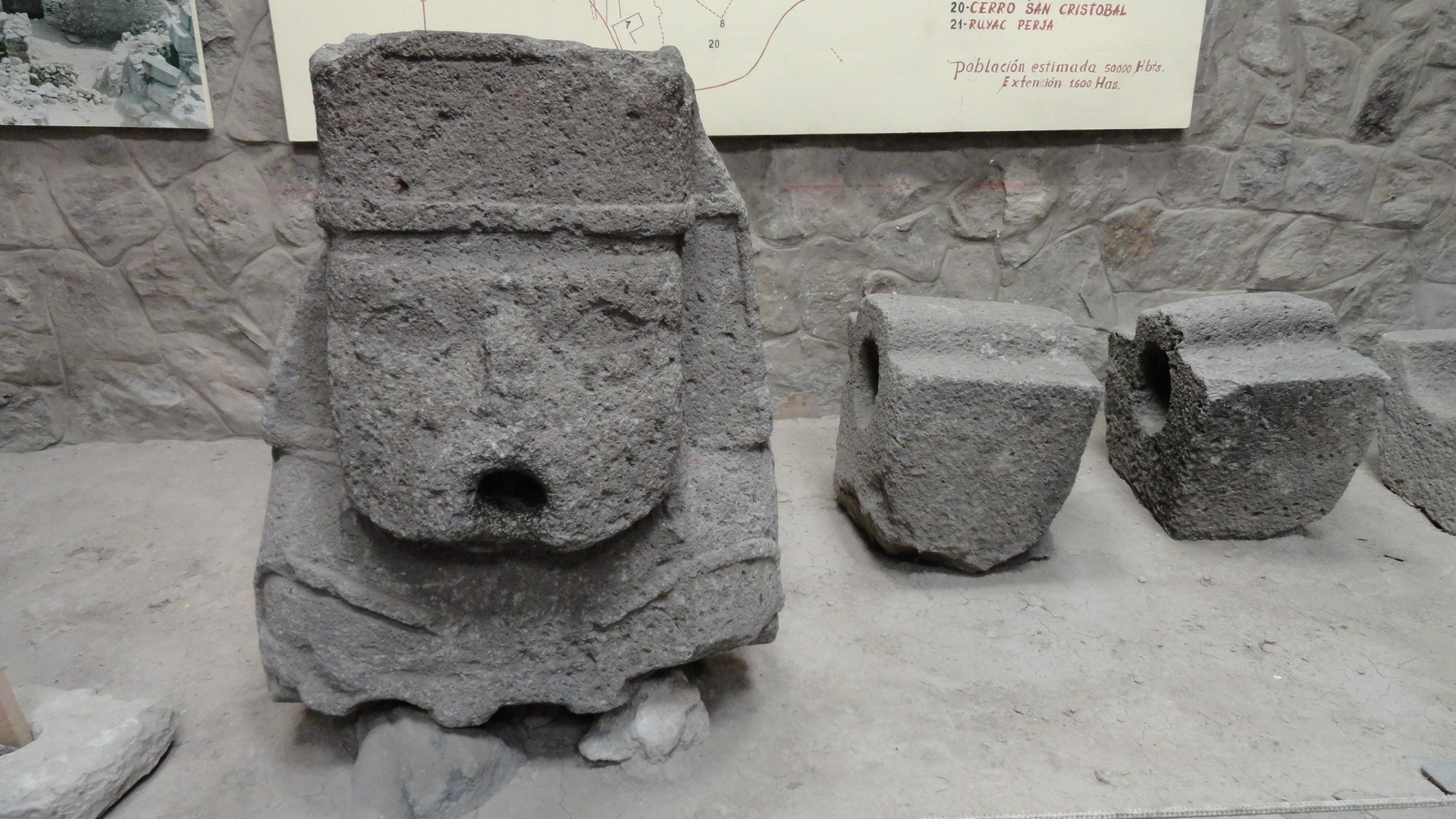 Monolito de la Cultura Wari - Ayacucho, Perú.